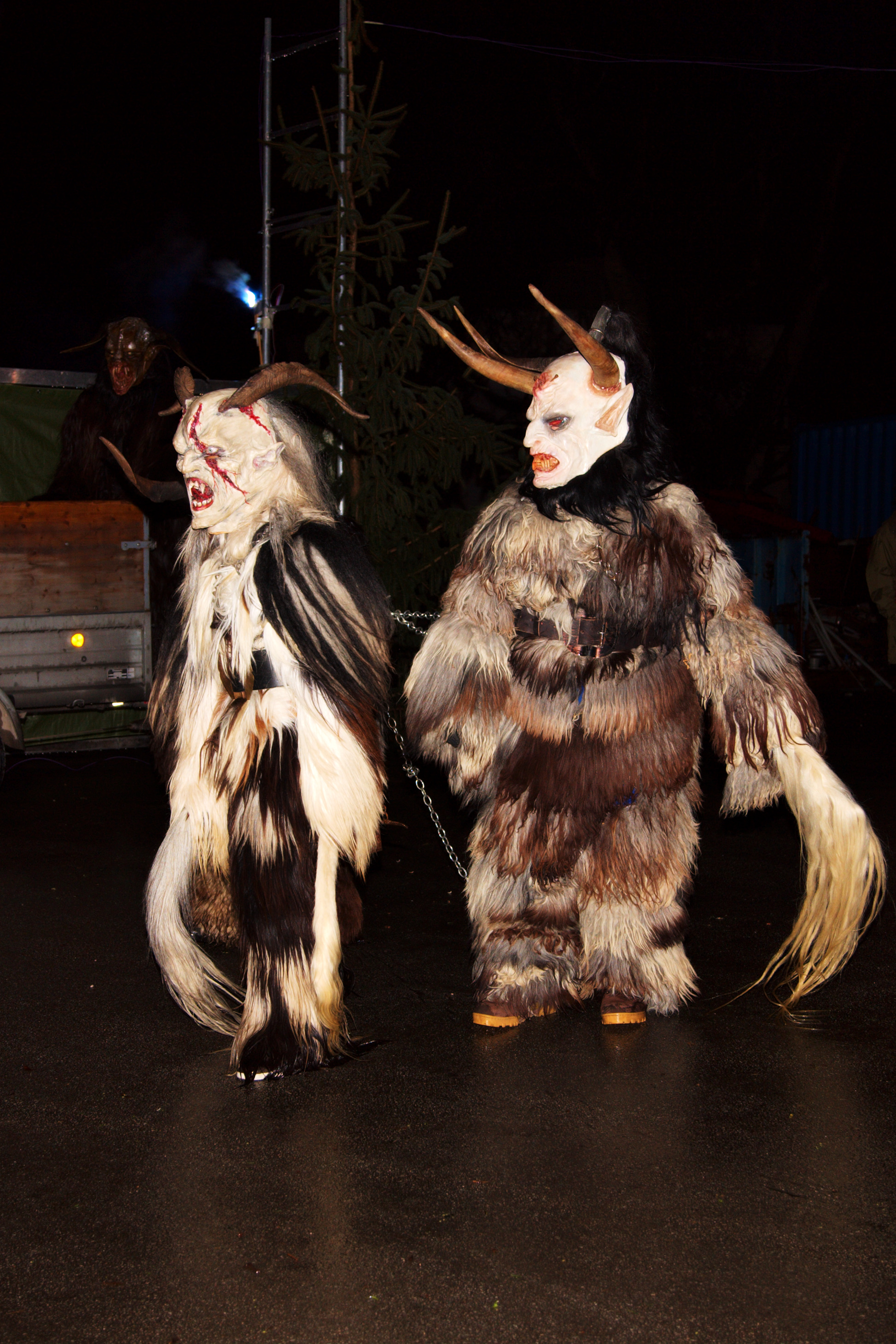 Krampus "Morzger Pass" Salzburg 2008